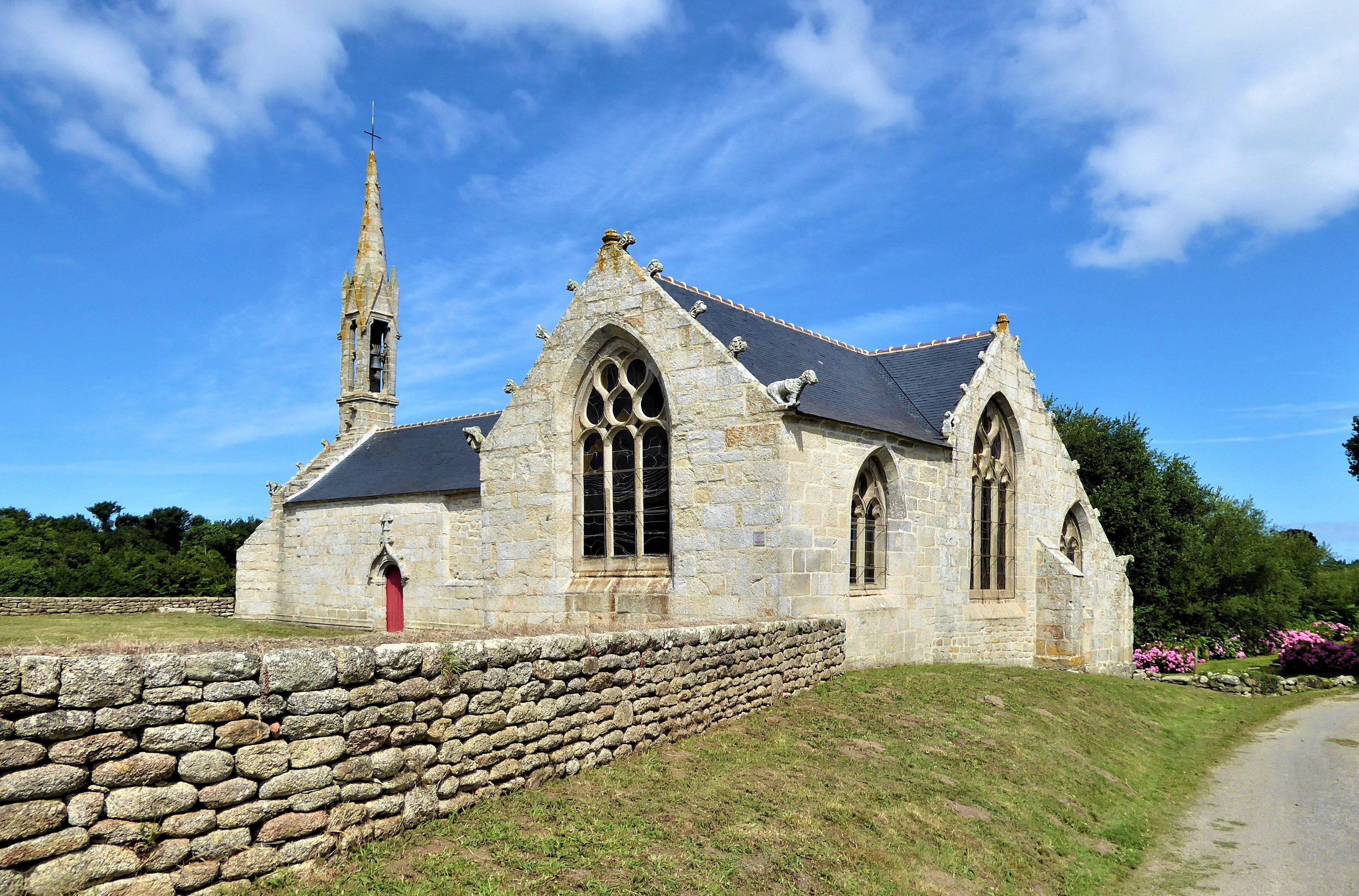 Chapelle Saint-Trémeur de Guilvinec